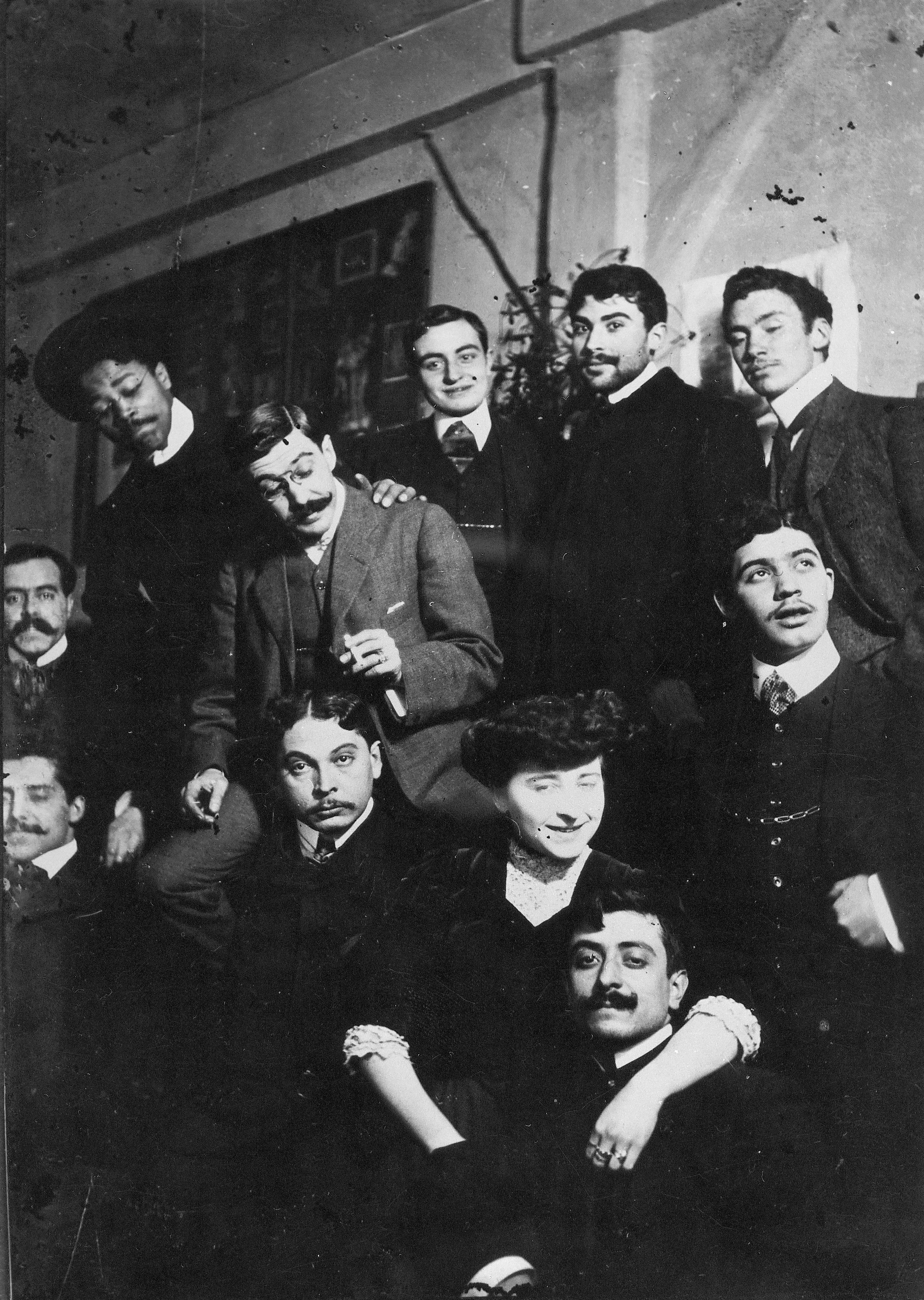 Amadeo de Souza Cardoso no atelier de Acácio Lino (1878-1956). Paris (França). Data de produção da fotografia original: 1907 [ASC03-20 IC]